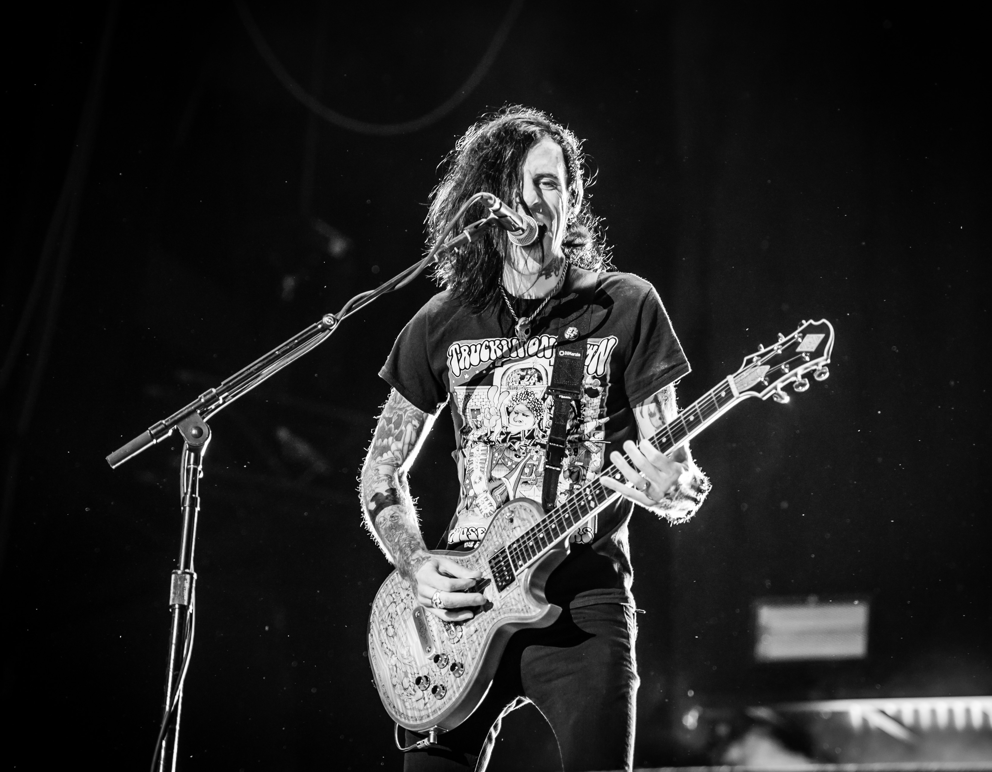 'Rock im Park 2018; Zeppelinfeld Nürnberg': 'Stone Sour'